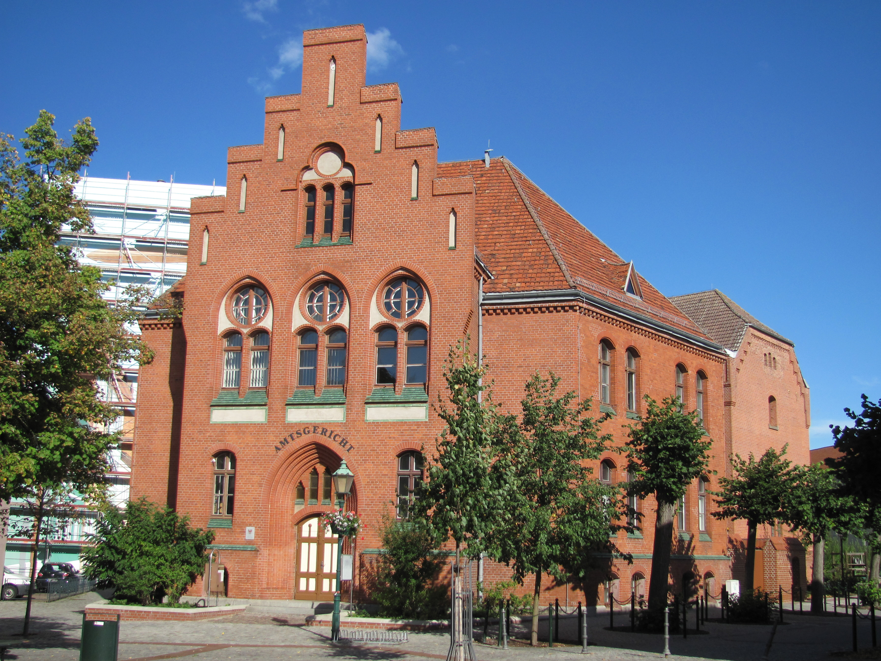 Amtsgericht Schwedt, Denkmalliste Nr. 35